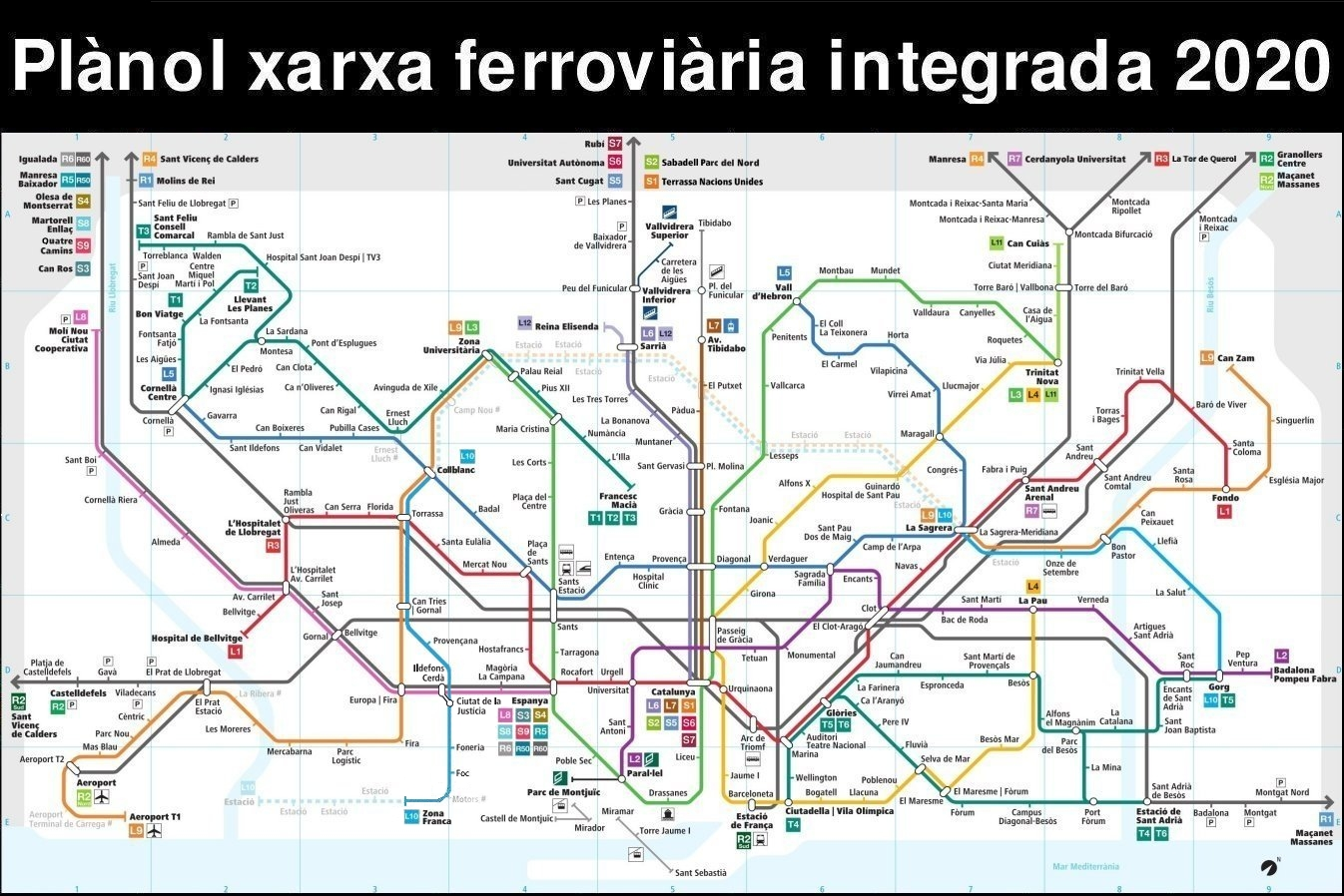 Mapa del Metro de Barcelona i la resta de serveis ferroviaris de la primera corona de la Xarxa Ferroviària Integrada.